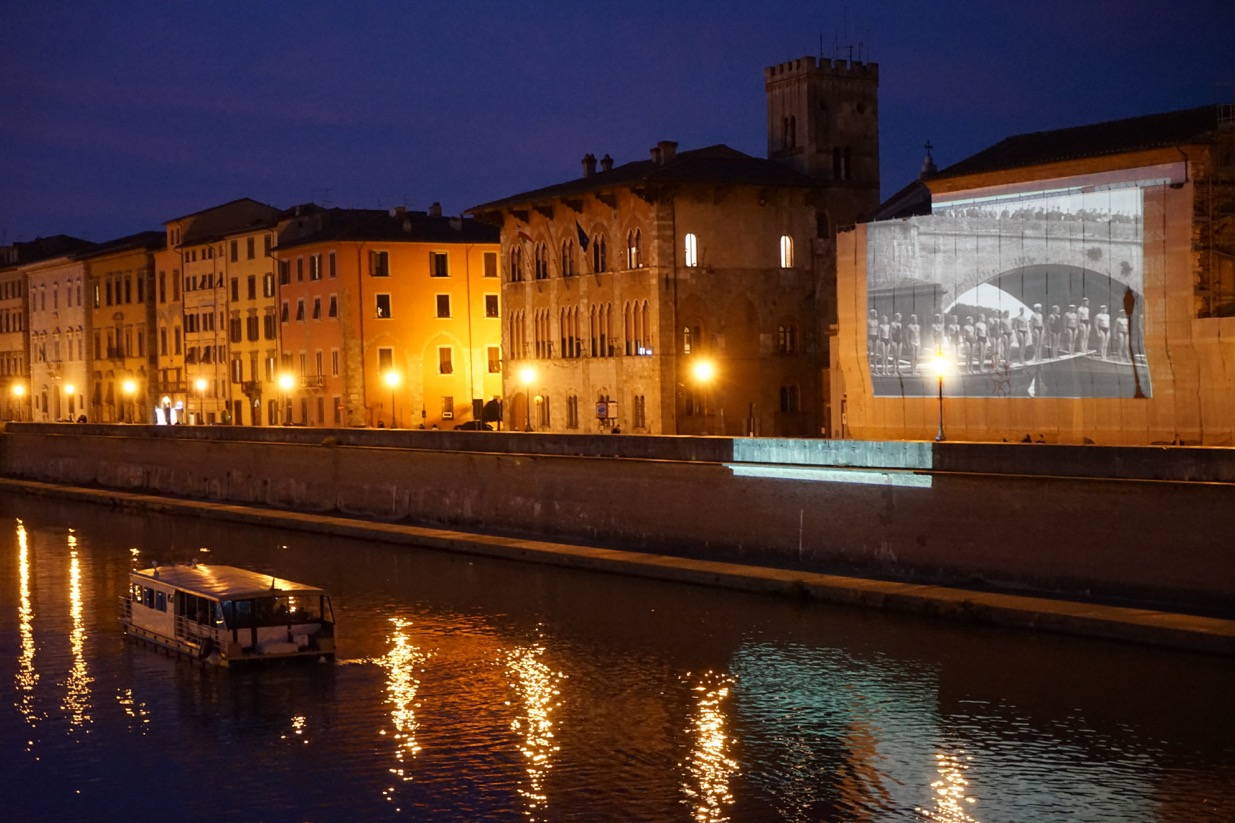 Tappa iniziale della crociera "Il fiume e la città" con proiezioni itineranti sul rapporto fra l'Arno e Pisa, dalle gare di nuoto ai navicellai di inizio 900, dalla guerra all'alluvione del 1966. A cura di Lorenzo Garzella e Acquario della Memoria.